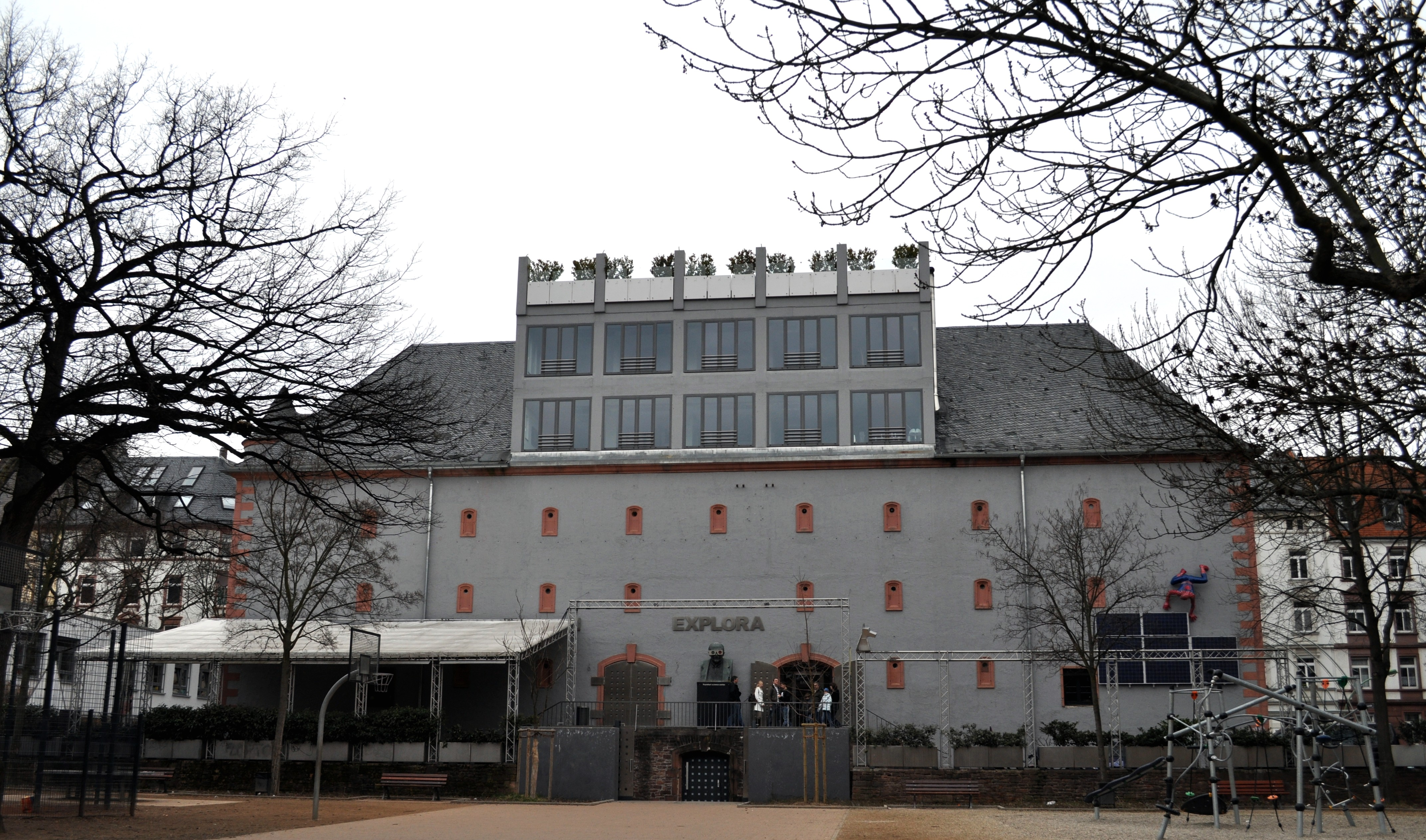 Außenansicht des Explora-Museums in Frankfurt am Main